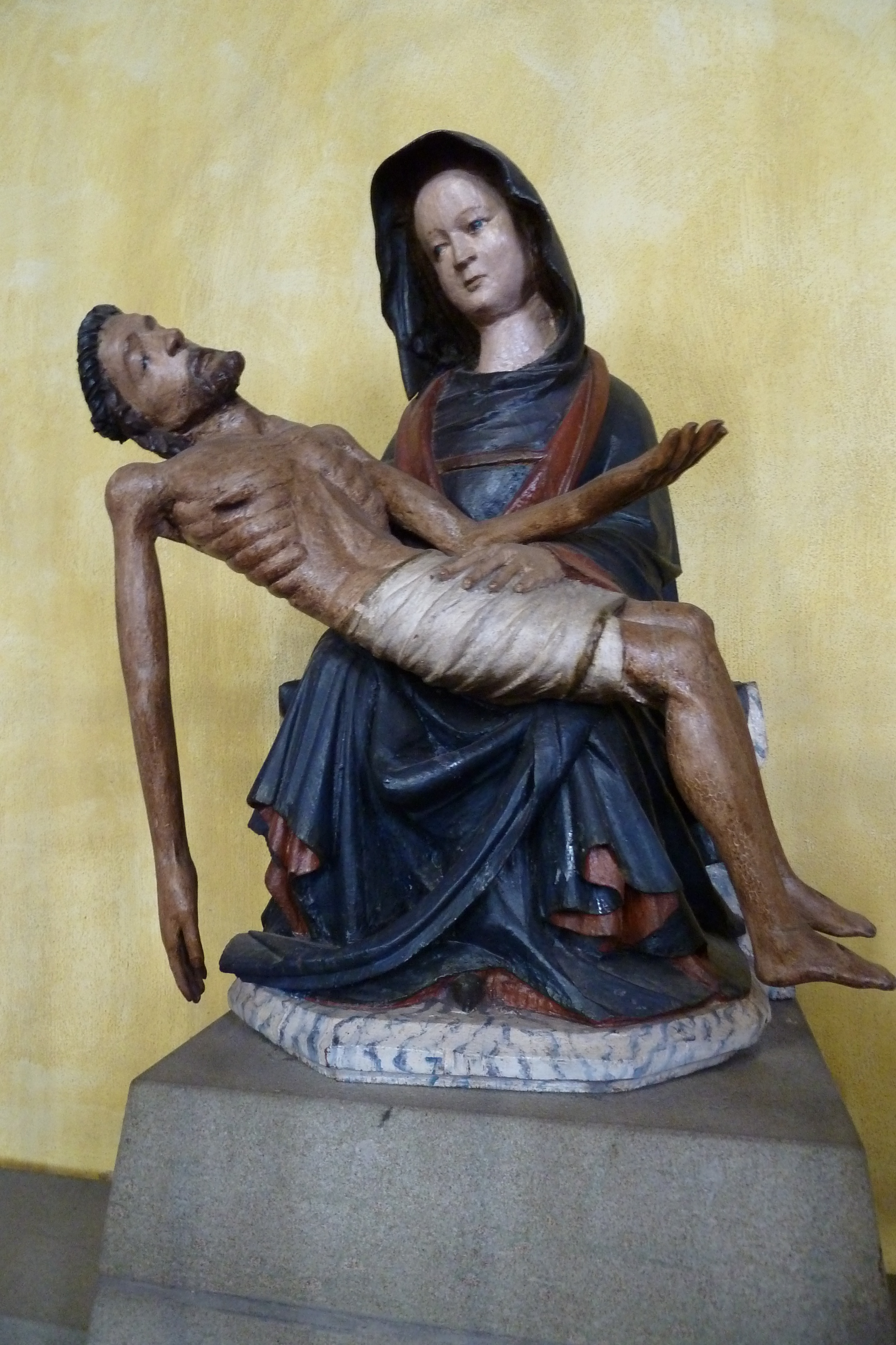 Pietà der St.-Nikolaus-Kirche in Rüthen.